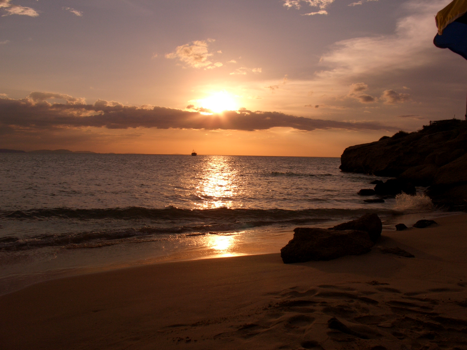 Inicio del Atardecer en una pequeña playa de la Península de Araya